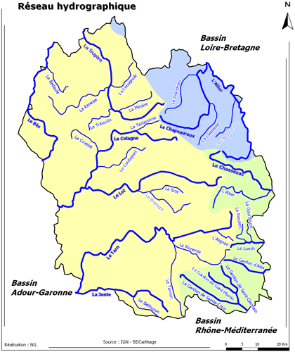 Carte de l'hydrographie de la Lozère